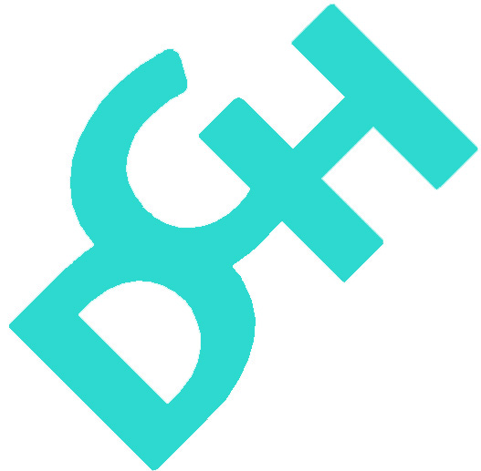 Logo 3